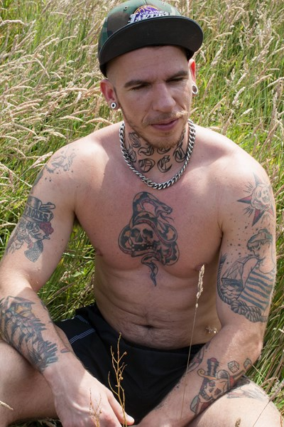 von roháč autoportrét